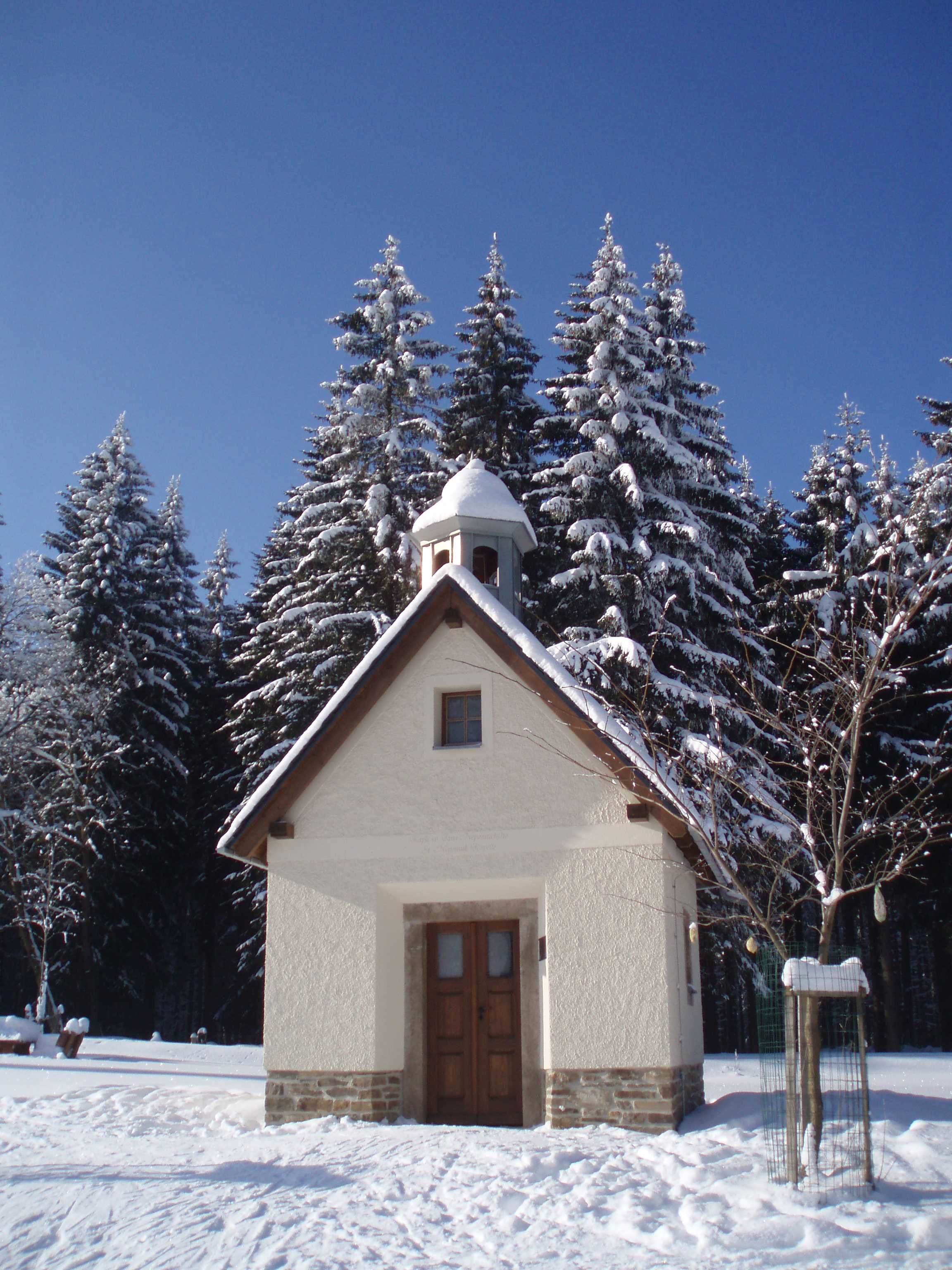 St. Nepomukkapelle Milov